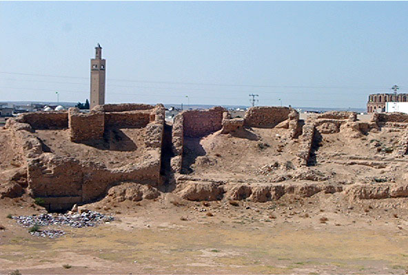 Gradins du second amphithéatre d'El Jem avec minaret à l'arrière plan.